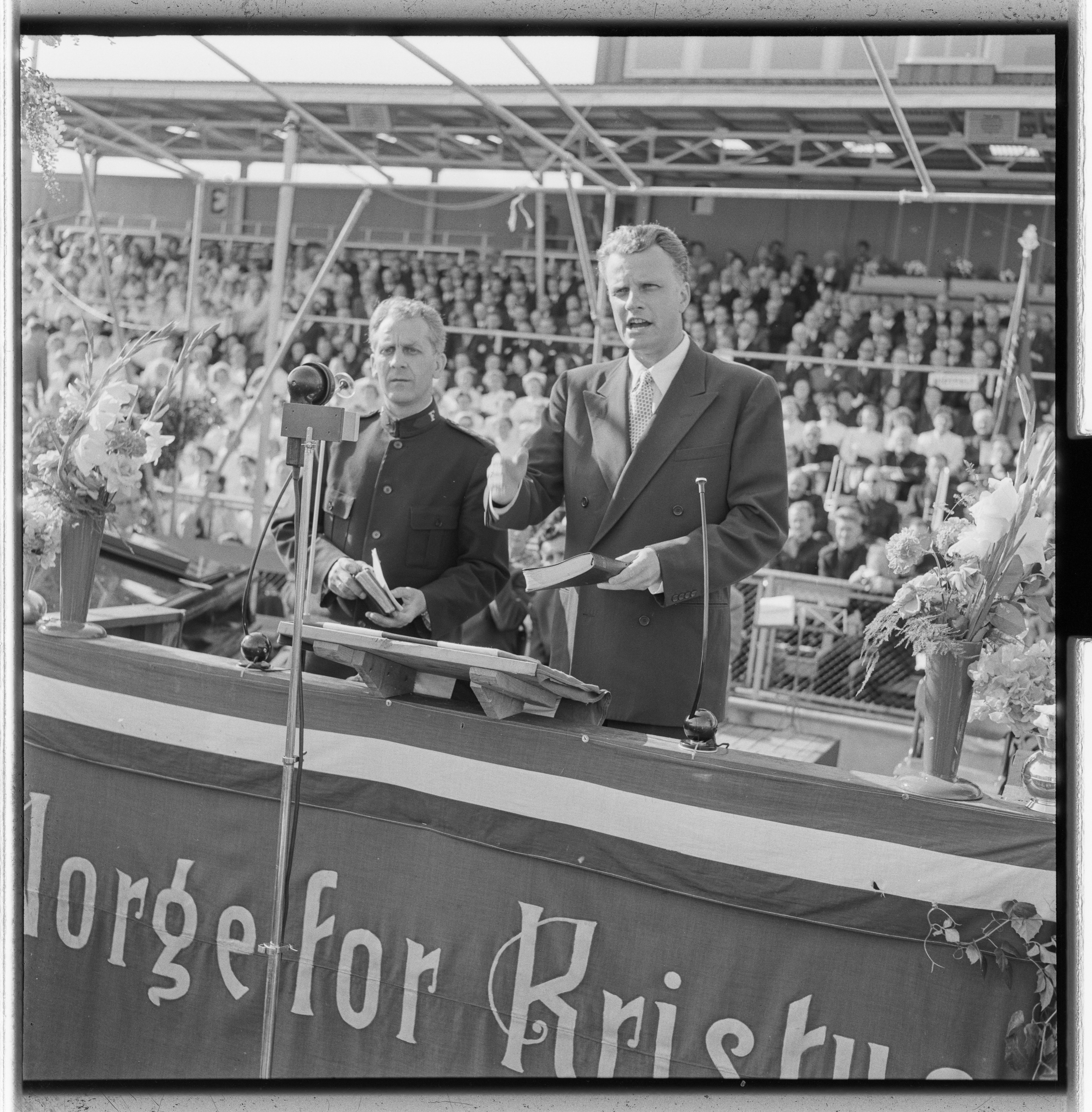 Bildet er hentet fra Arkivverket. Billy Graham Arkivinstitusjon : Riksarkivet Arkivnavn : Billedbladet NÅ Sted : Norge, Oslo, Oslo, Ullevål stadion Emneord: kristendom, forkynnelse, møter Avbildet: Graham, Billy